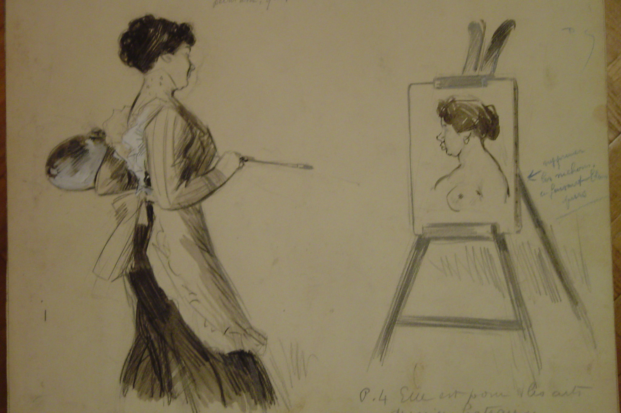 Le peintre